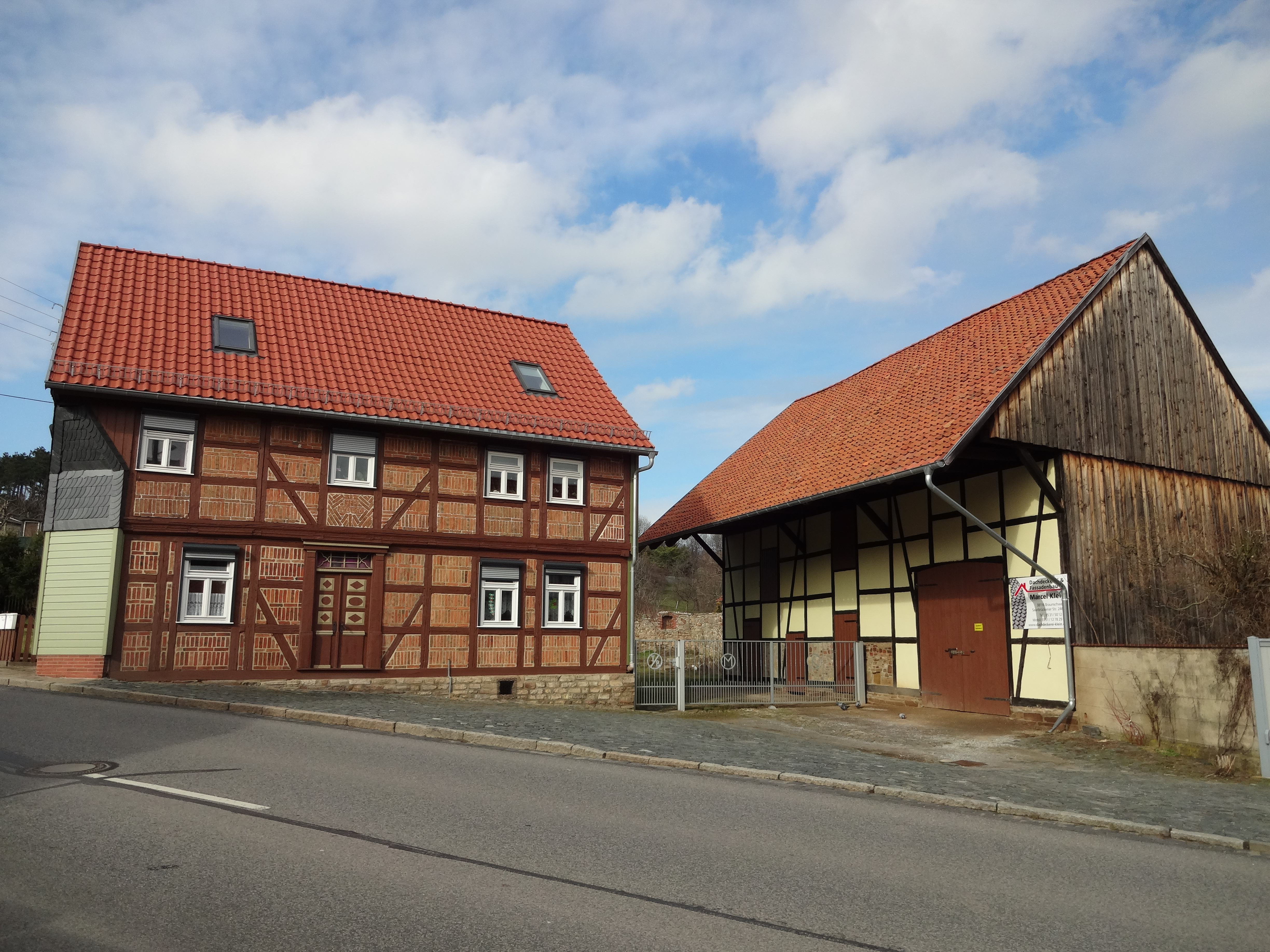 Denkmalgeschütztes Bauernhaus in der Wernigeröder Straße 3 in Benzingerode (Ortsteil von Wernigerode)